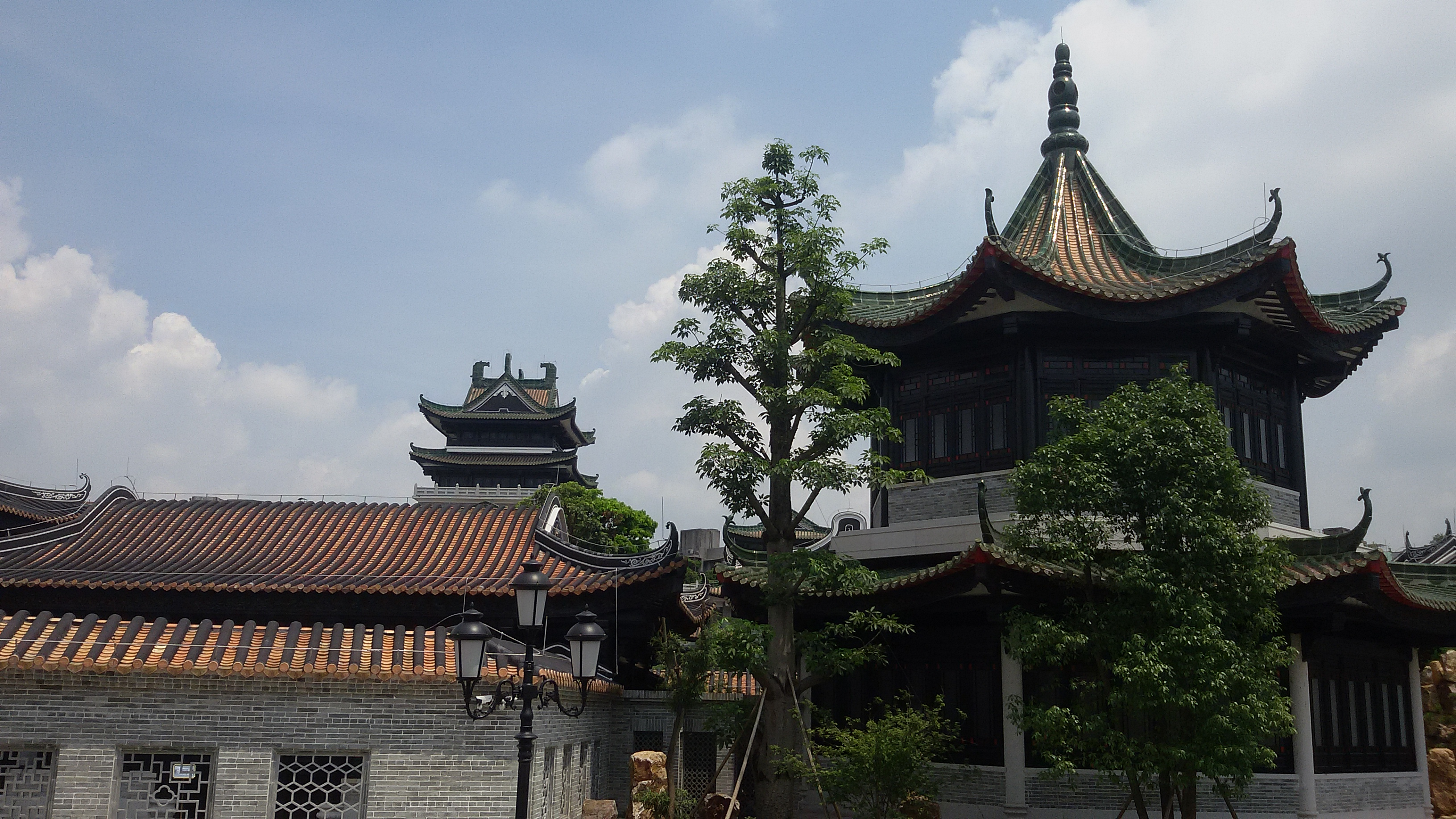 粵語: 粤劇㙯術博物館